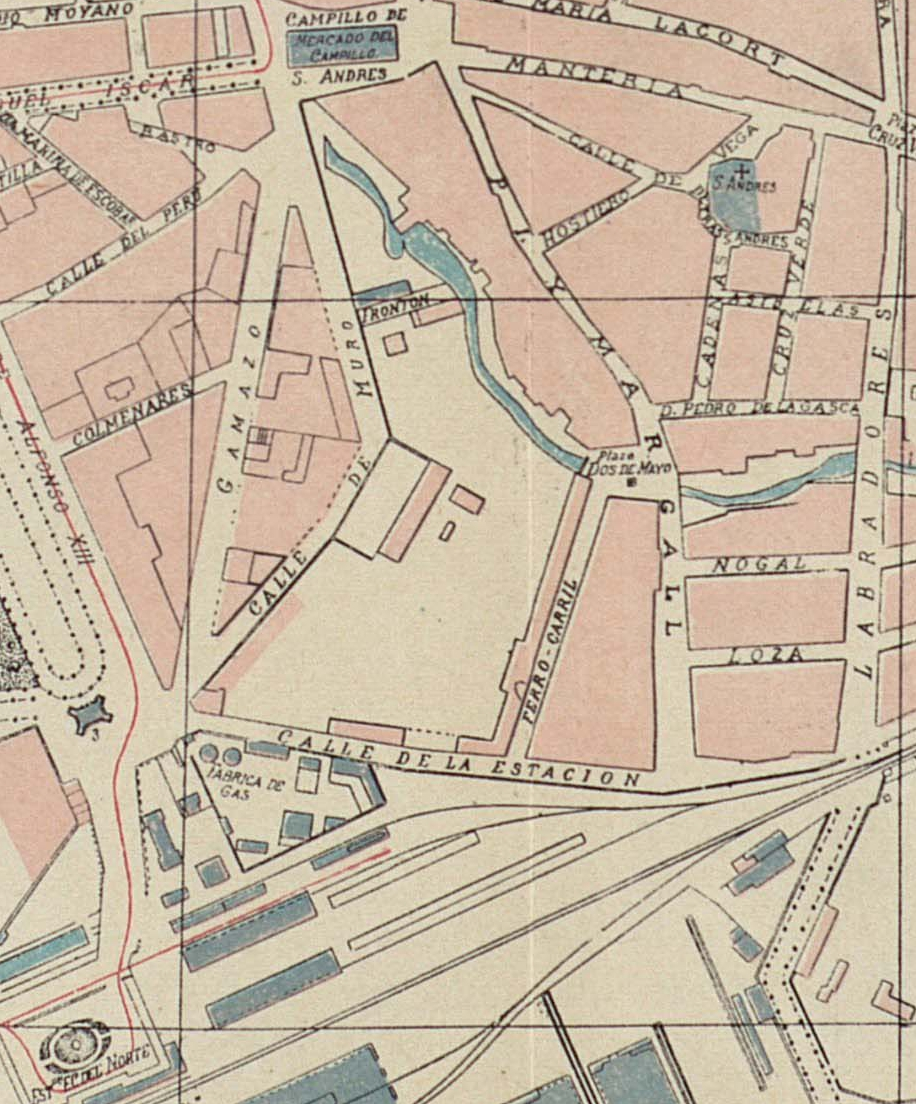 Fragmento plano de Valladolid